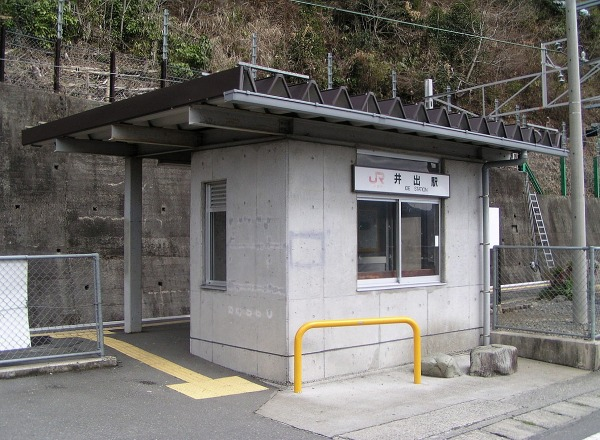 Ide Station, Nanbu, Yamanashi, Japan